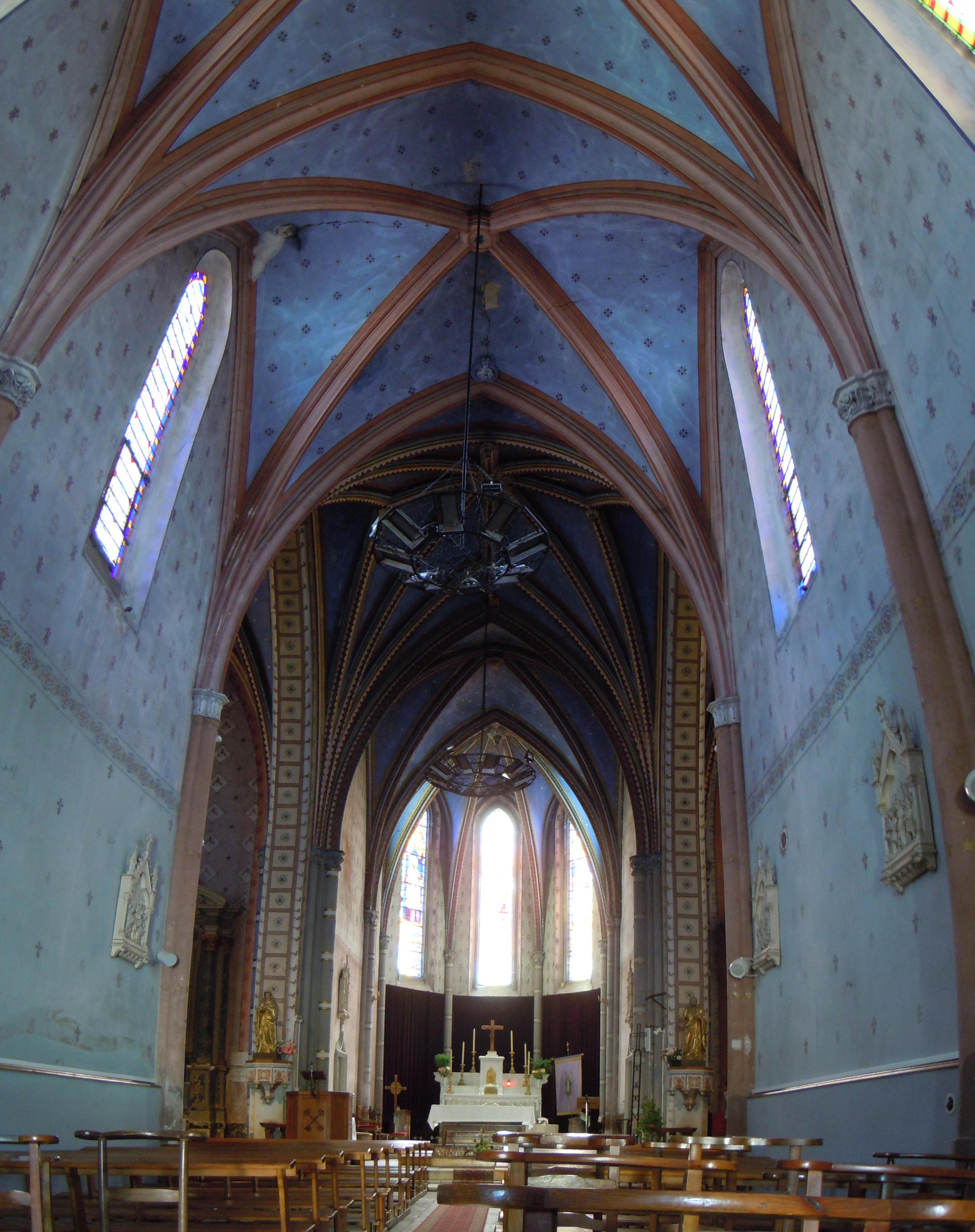 Nef de l'Eglise Saint-Pierre - La Bridoire - Savoie -France